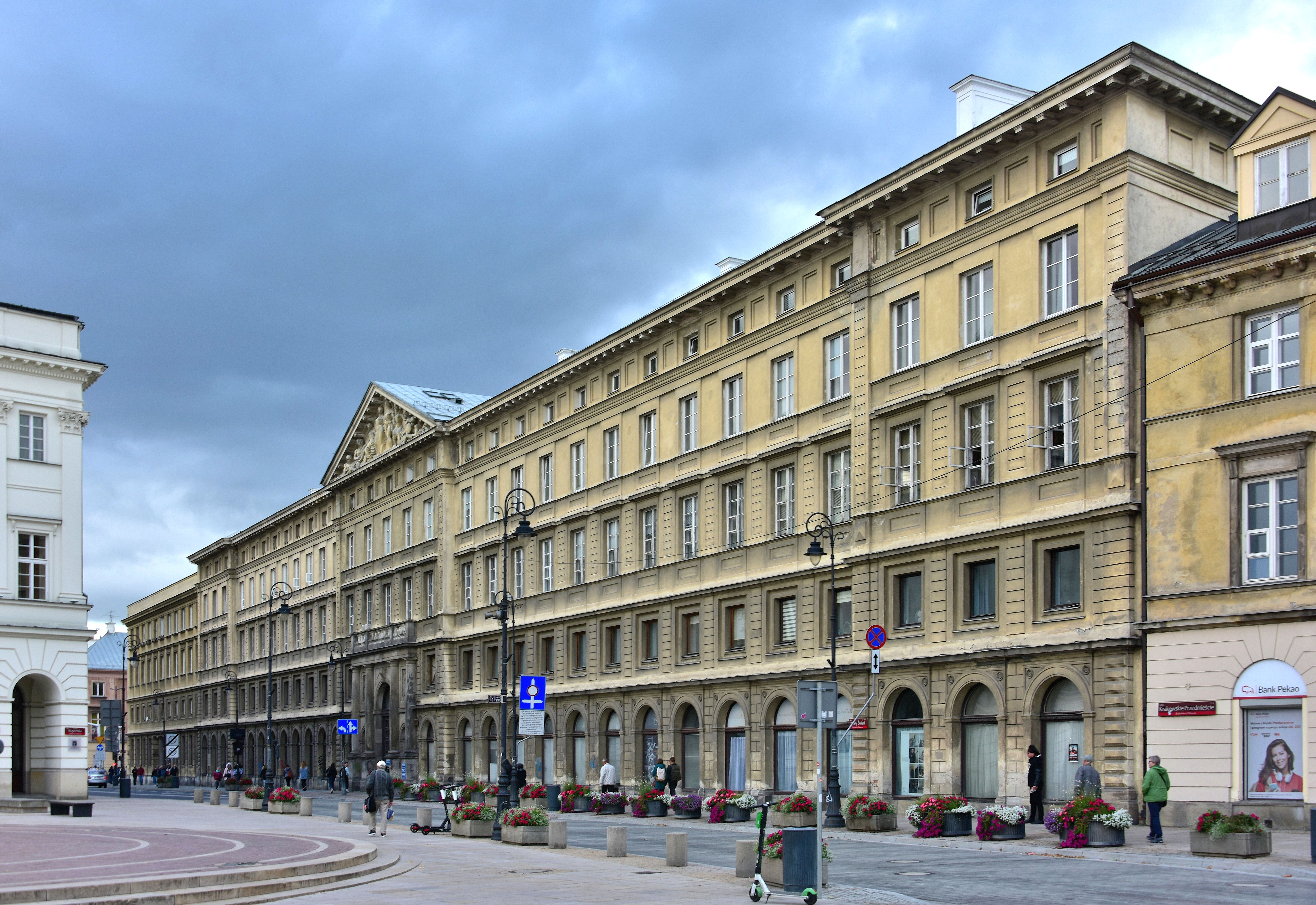 Pałac Zamoyskich przy ul. Nowy Świat w Warszawie